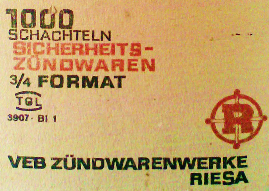 Kartonage - Verpackung - Riesaer Zündwarenfabrik